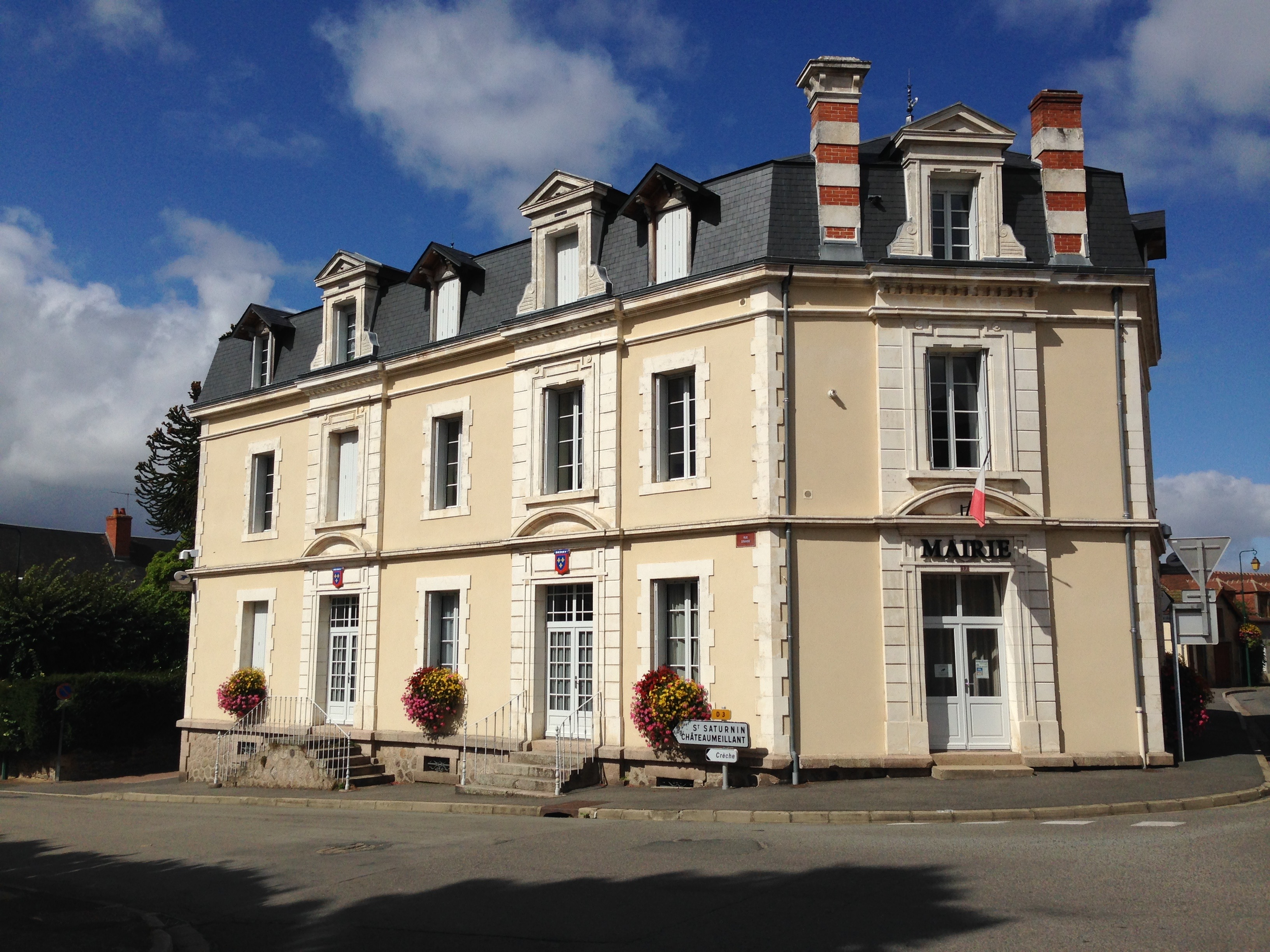 Mairie